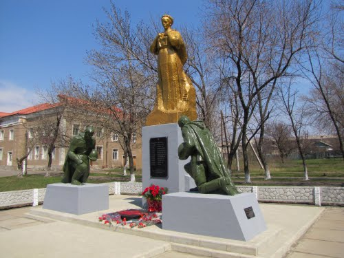 Бринь Л.А.